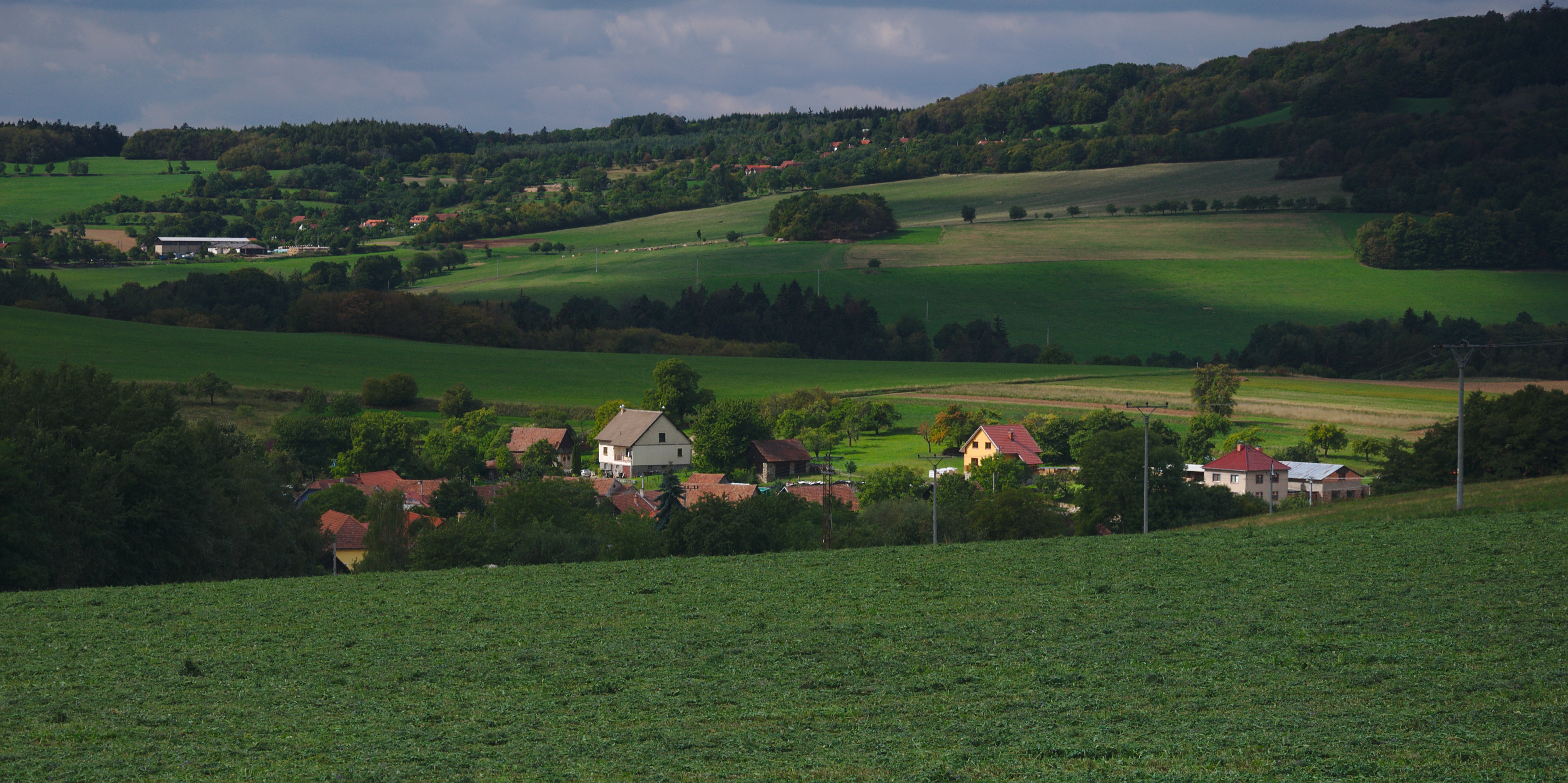 Pohled na obec od východu, Strhaře, okres Brno-venkov